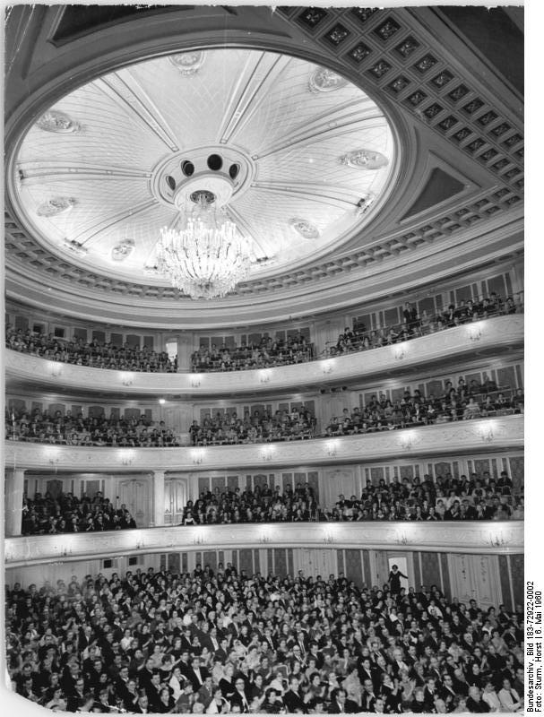 Zentralbild Sturm 6.5.1960 Deutsche Staatsoper in Berlin UBz: Blick in den Zuschauerraum.